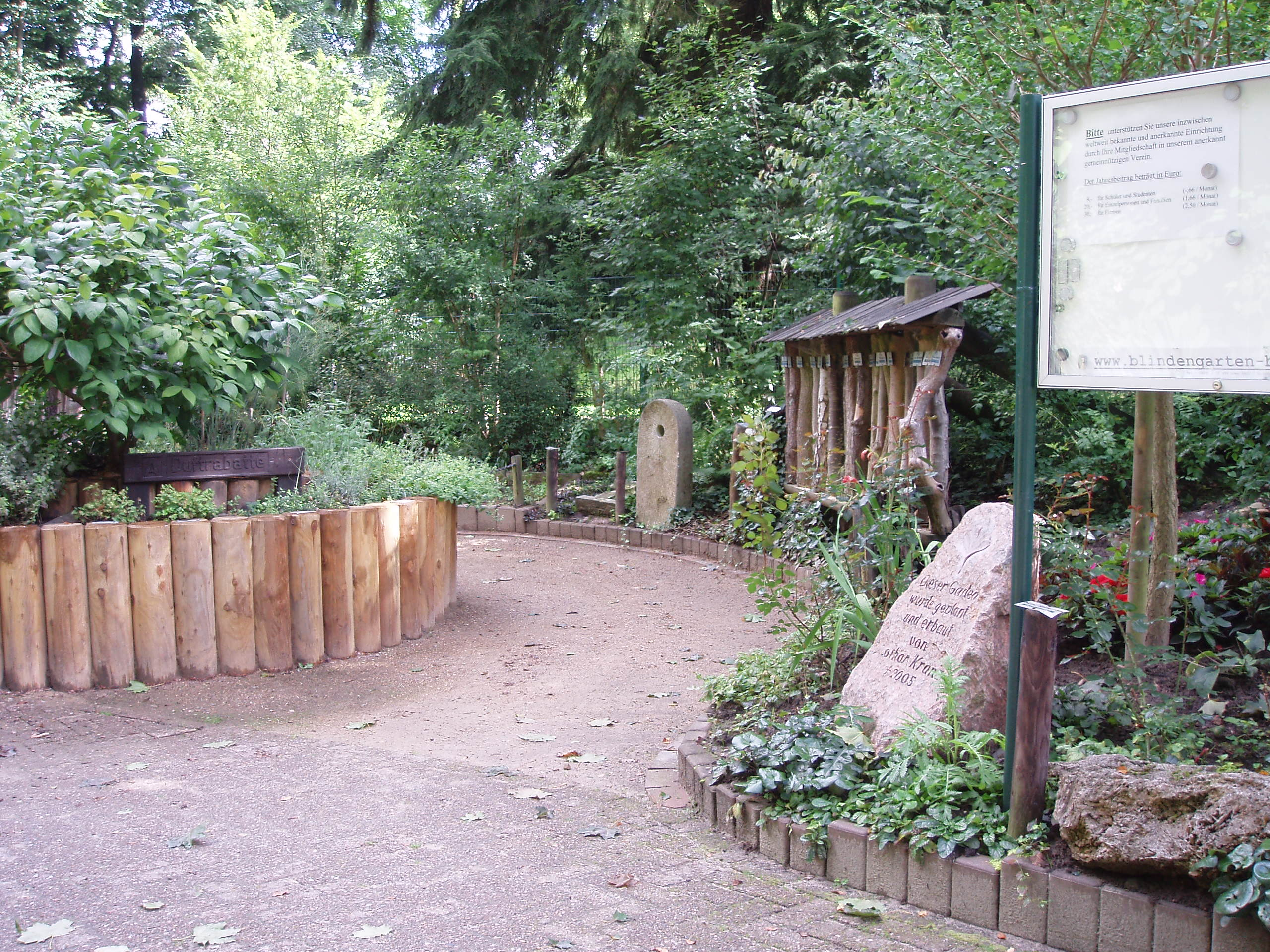 Blindengarten in Knoops Park, Bremen